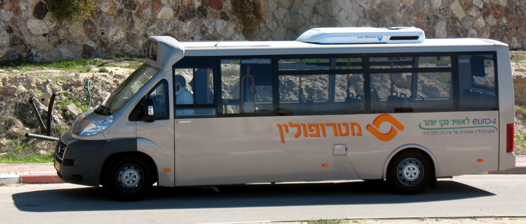 Metropoline mini-bus in Line 1, Arad, Israel.